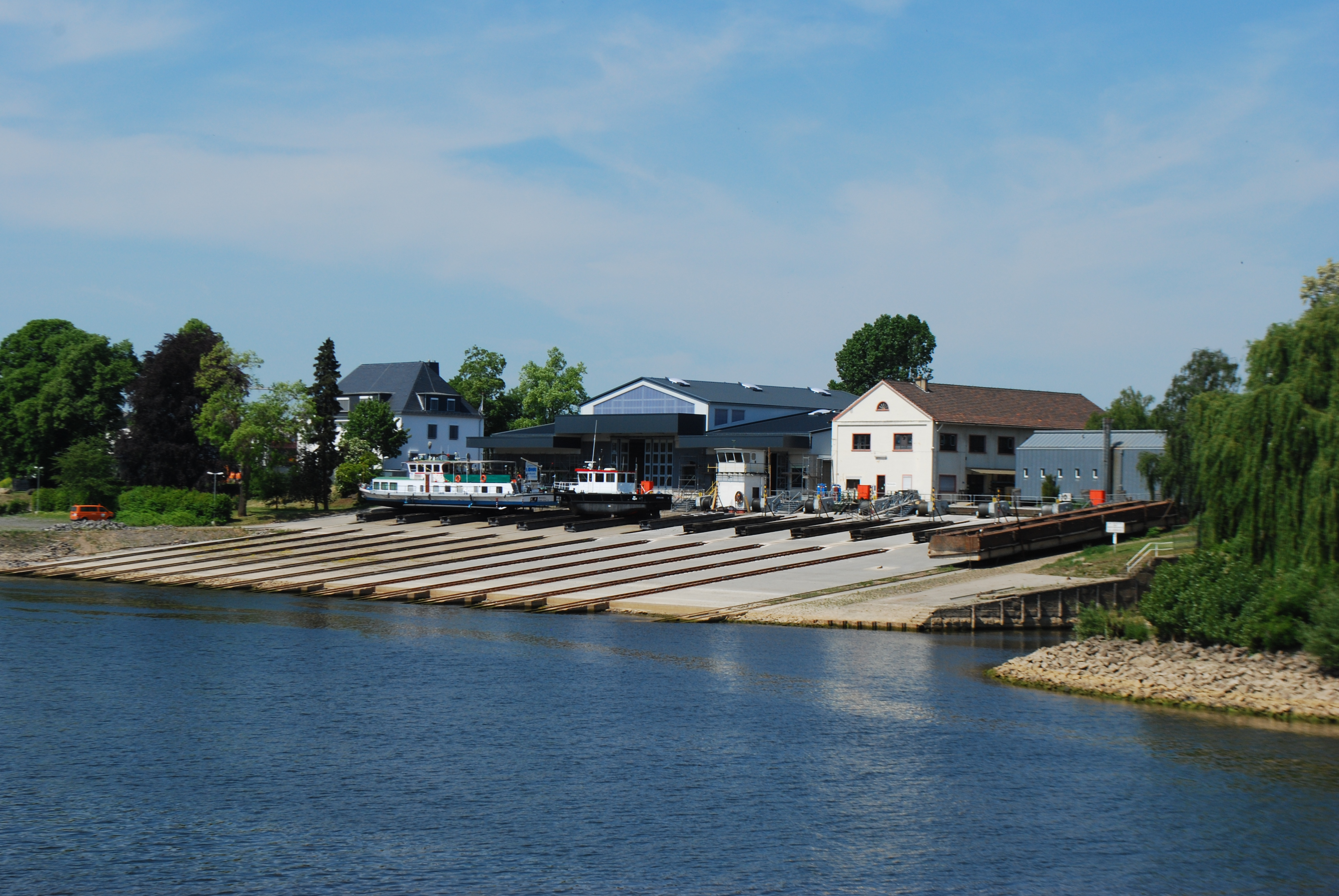 La rive gauche de la Moselle, à hauteur du Deutsche Eck, au confluent avec le Rhin.